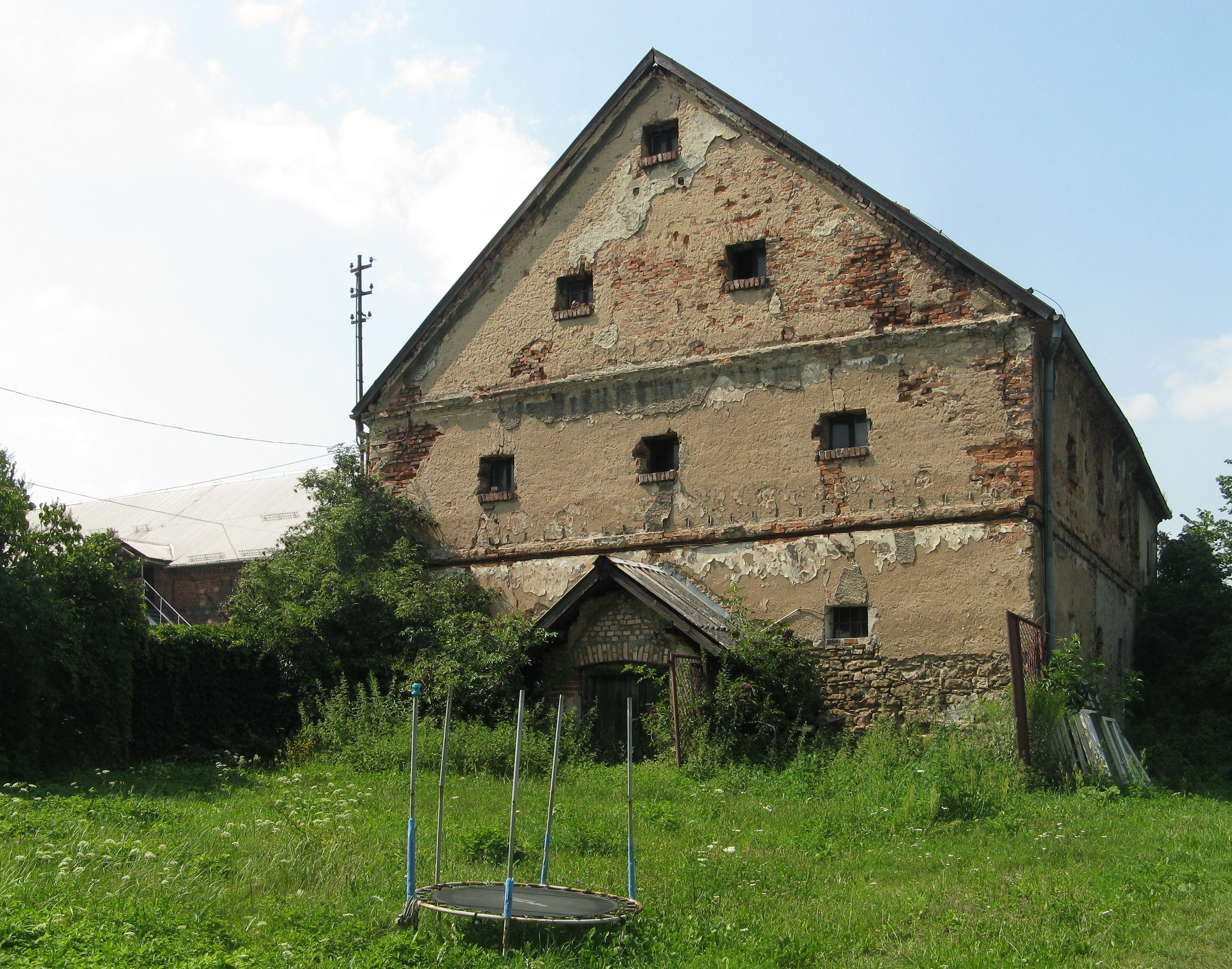 Spichlerz w Bytomiu-Stolarzowicach z XIX wieku, część zespołu dworskiego, zabytek nr rej. 663/66 z 28.05.1966.